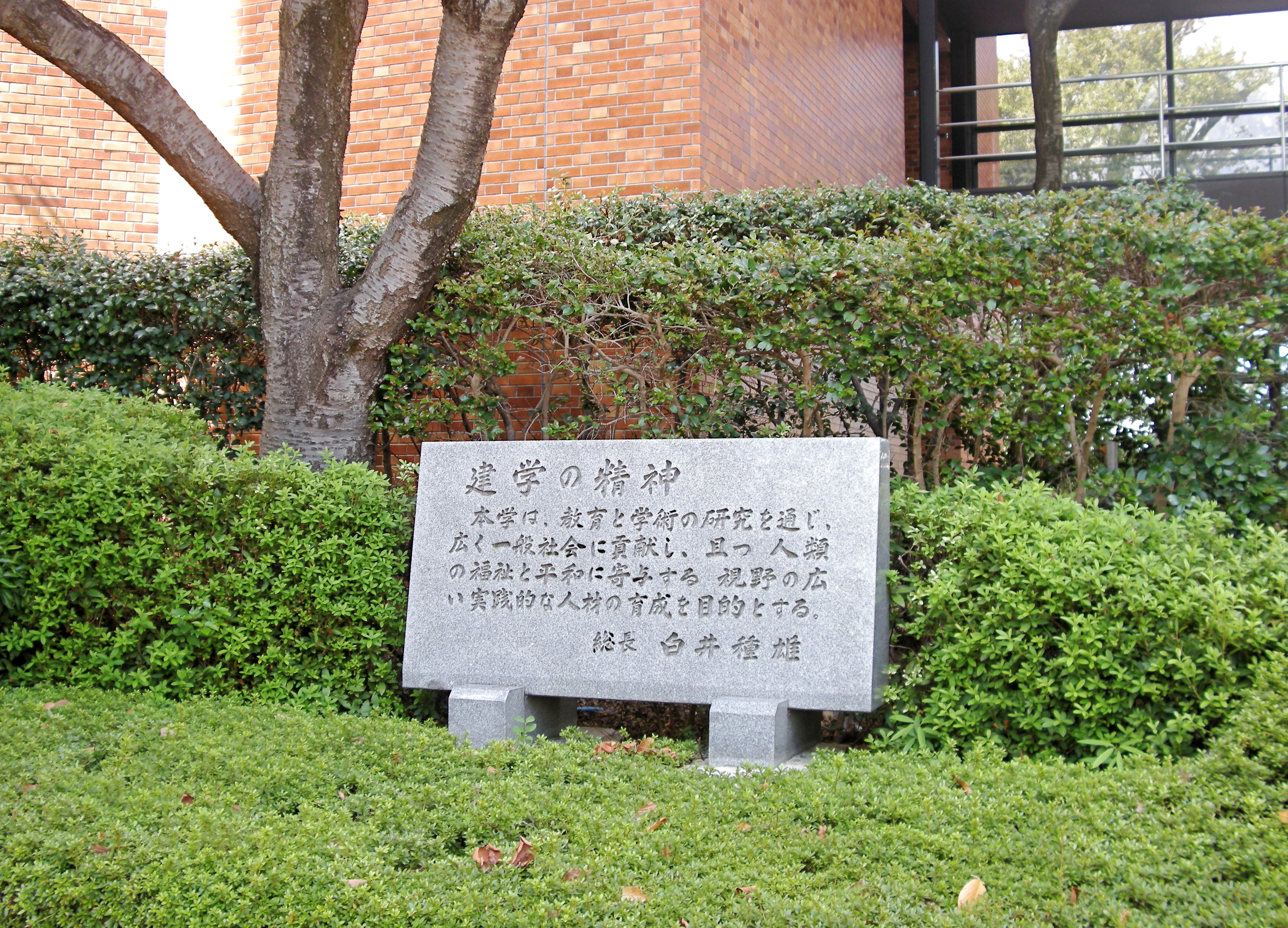 Osaka Gakuin University (Osaka, Japan)